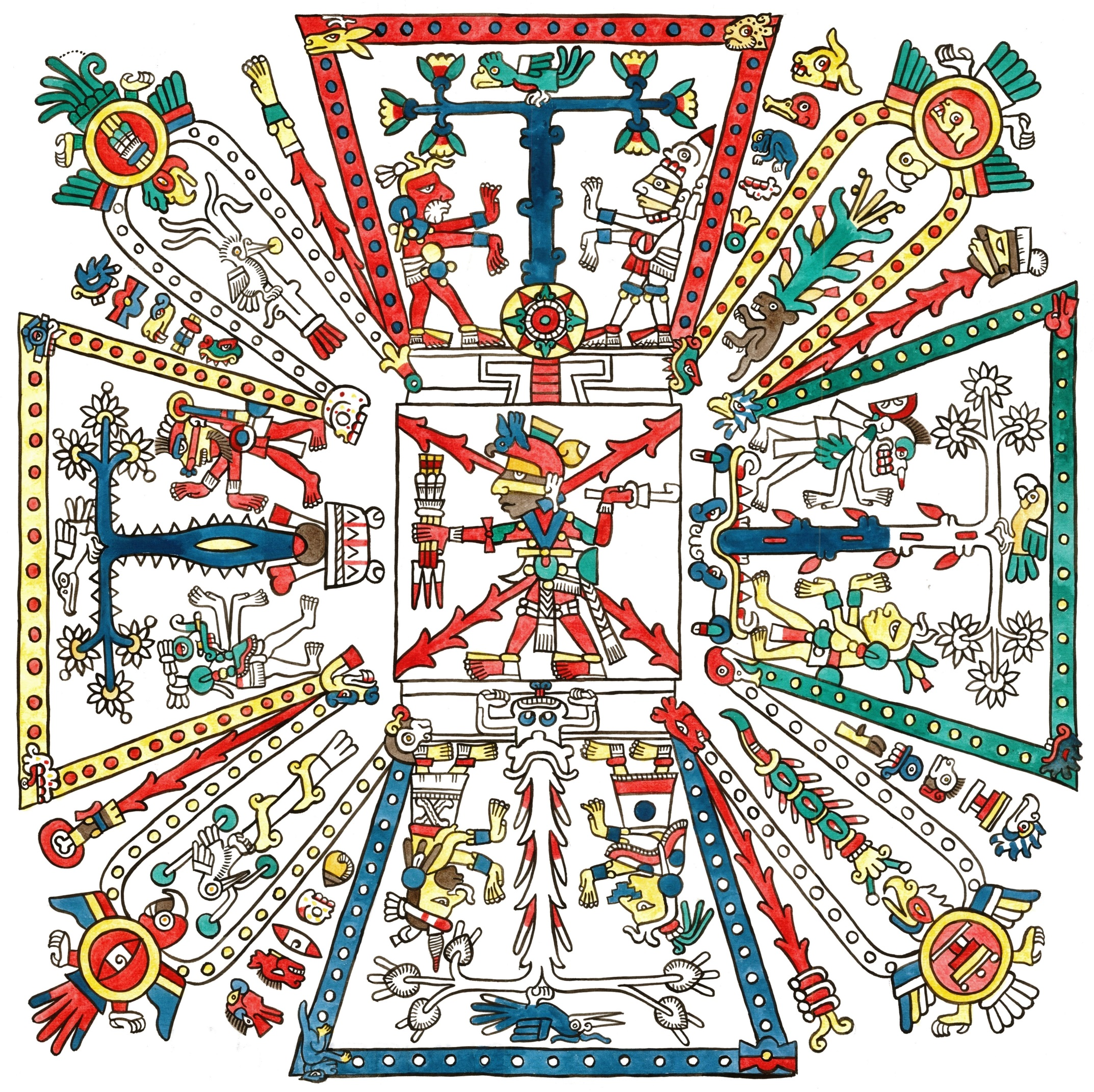 Detalle del Códice Féjervary-Mayer. También conocido como Códice Pochteca. Dibujado por Lacambalam.